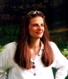 Porträt Tzveta Sofronieva